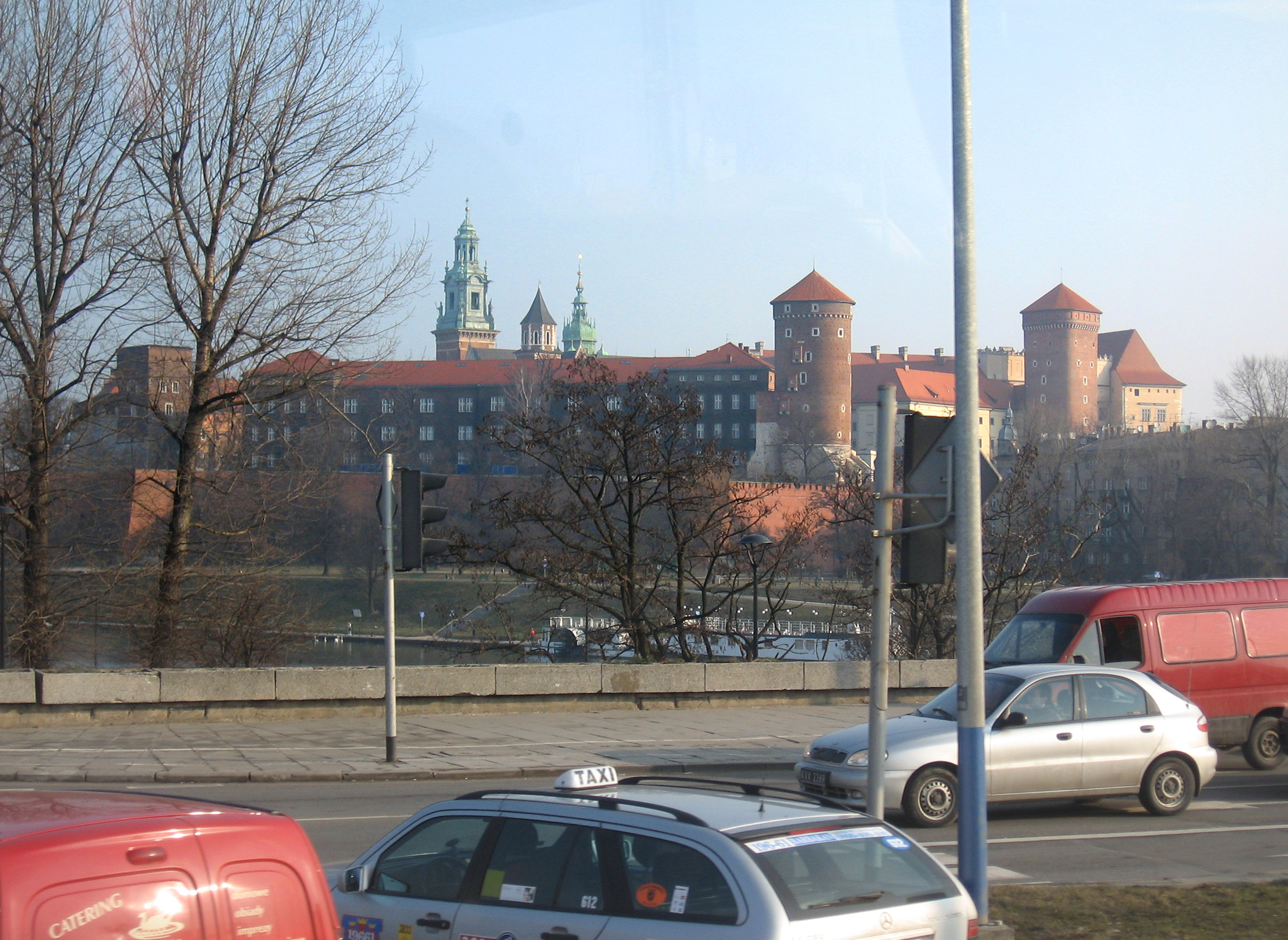 הארמון של מלכי פולין בקרקוב